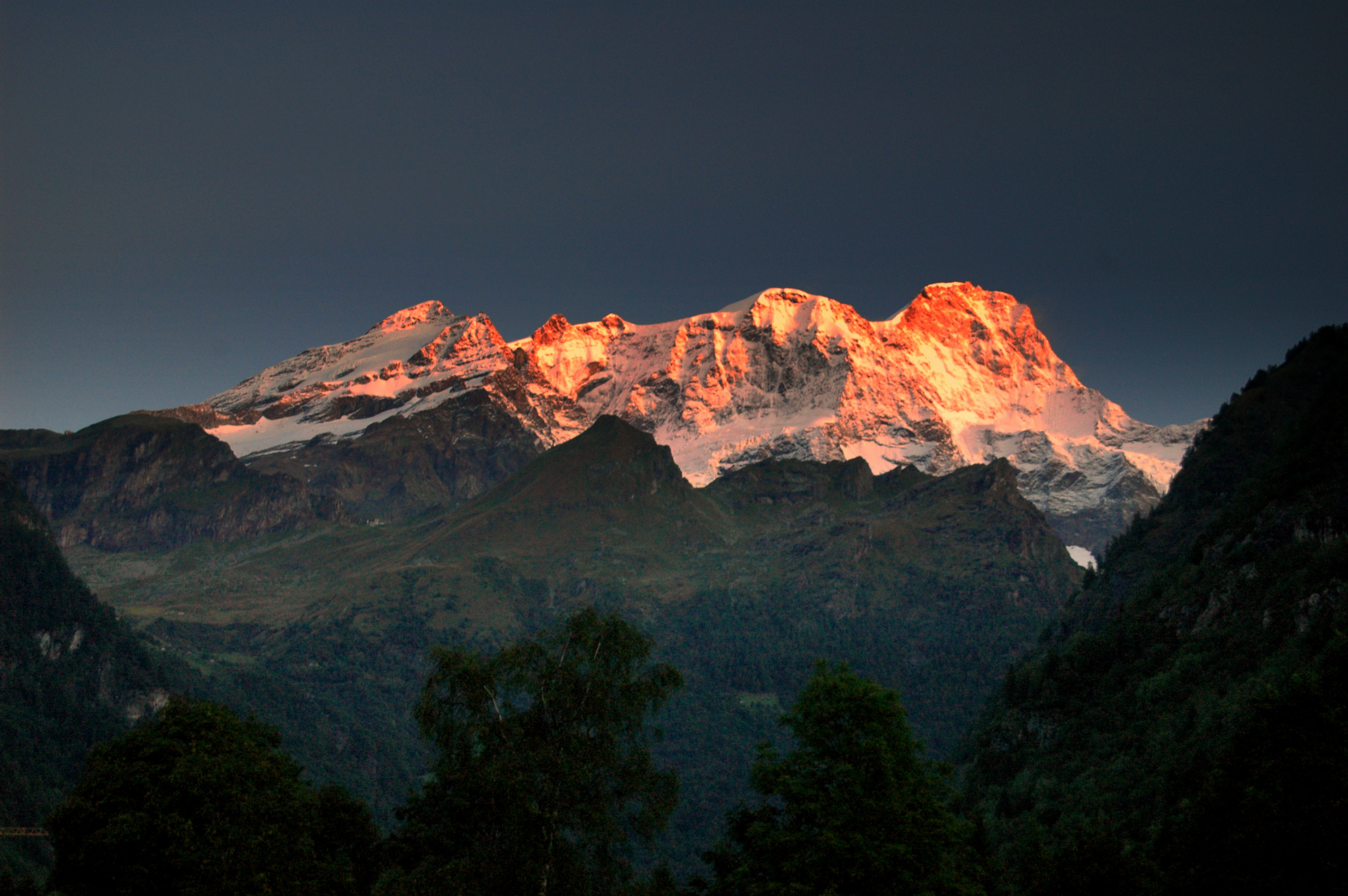 parete valsesiana del Monte Rosa da Alagna Valsesia